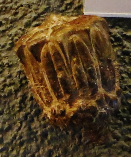 Fossil of Eucalyptocrinites - Took the picture at Naturalis, Leiden